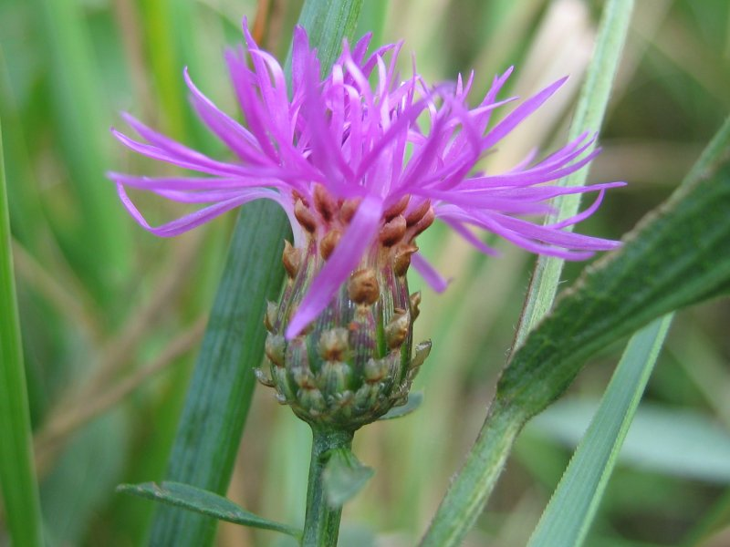 Wiesen-Flockenblume (Centaurea jacea)